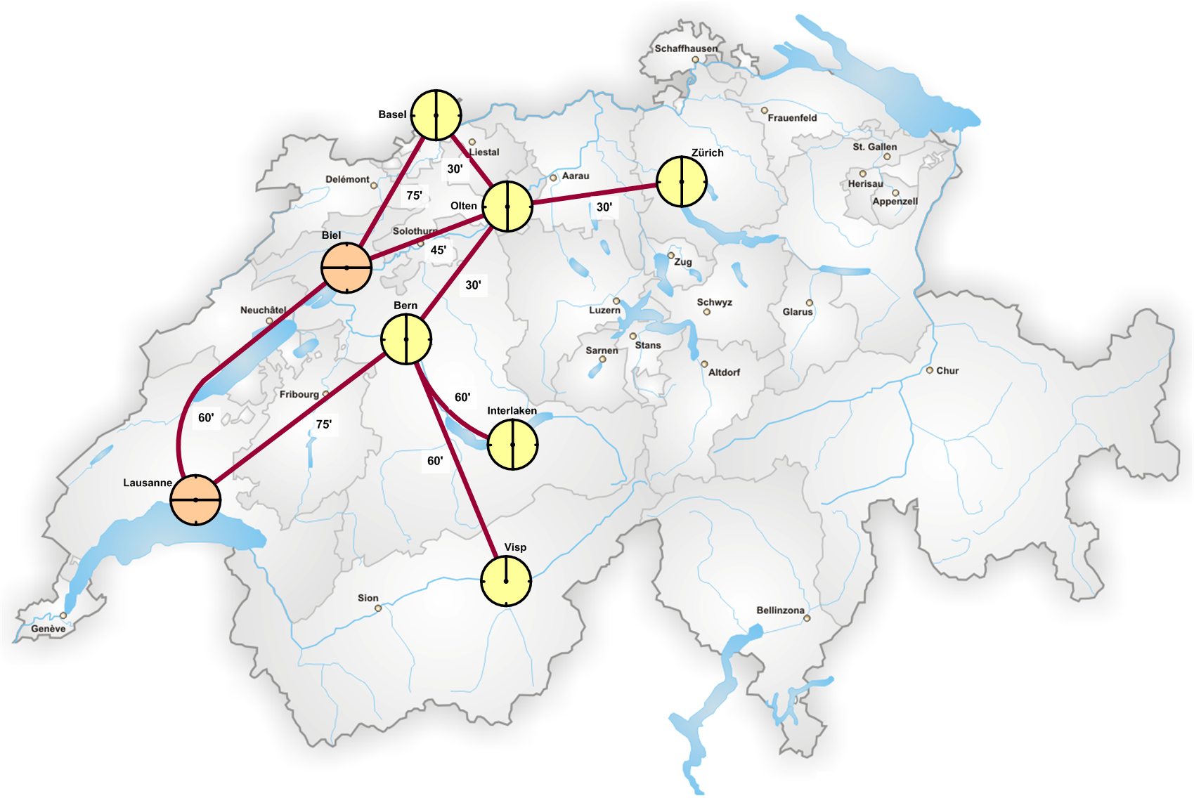 Knotensystem der Schweiz mit Lötschberg-Basistunnel(2007)